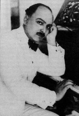 Portrait du compositeur et pianiste haïtien Justin Elie.